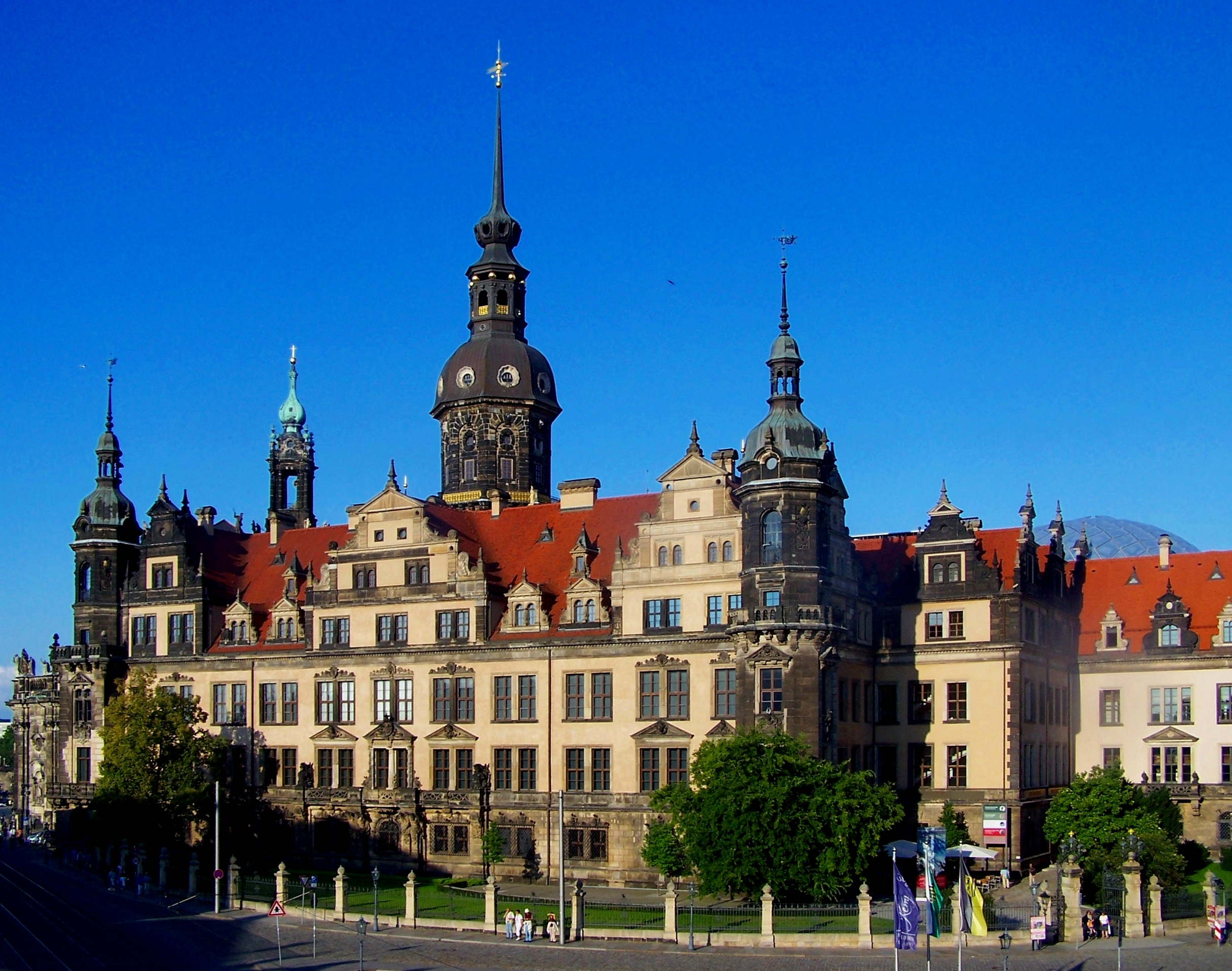 Residenzschloss Dresden